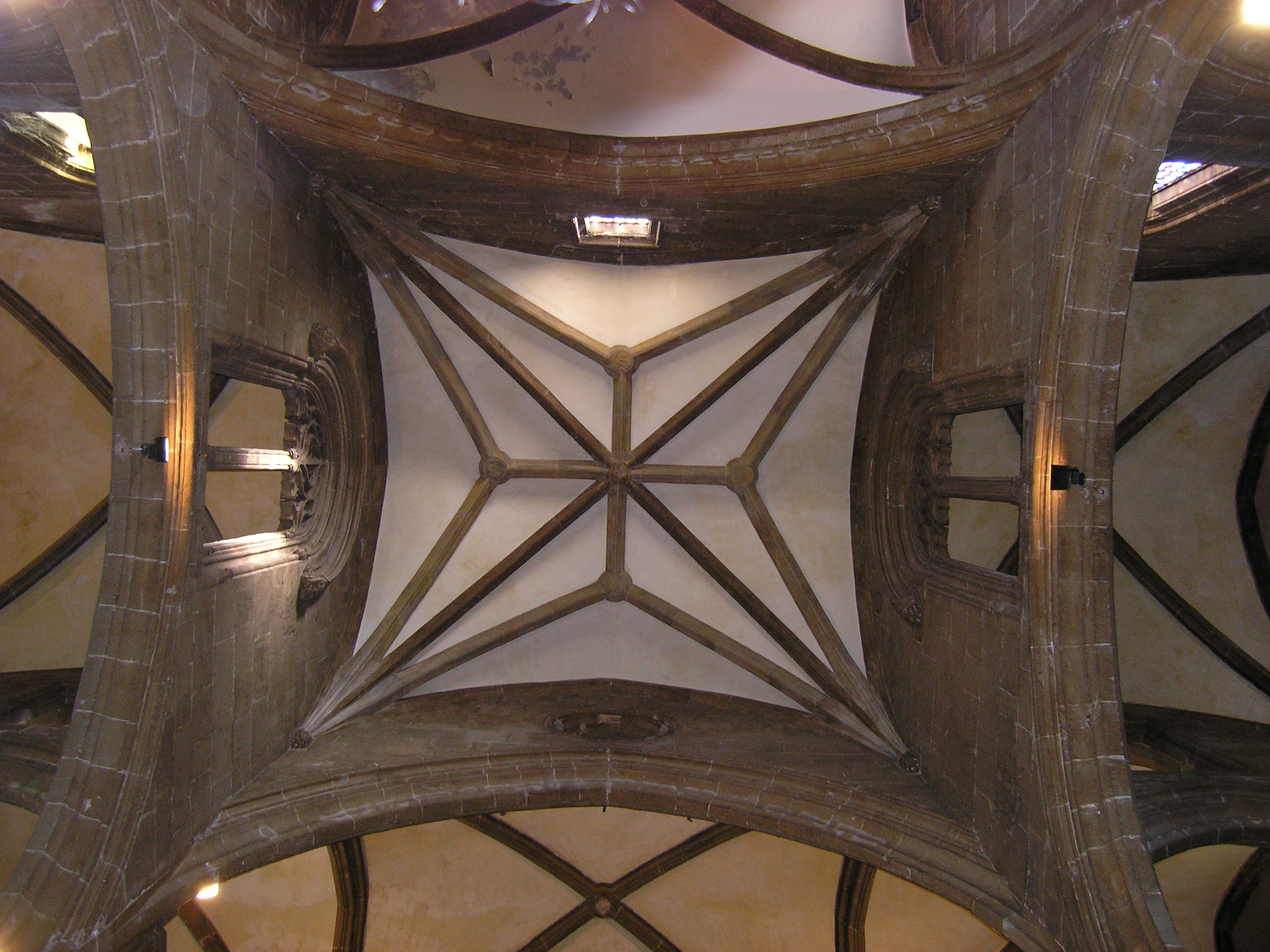 Sicilianu: Crèsia di Santa Marìa dâ Catena